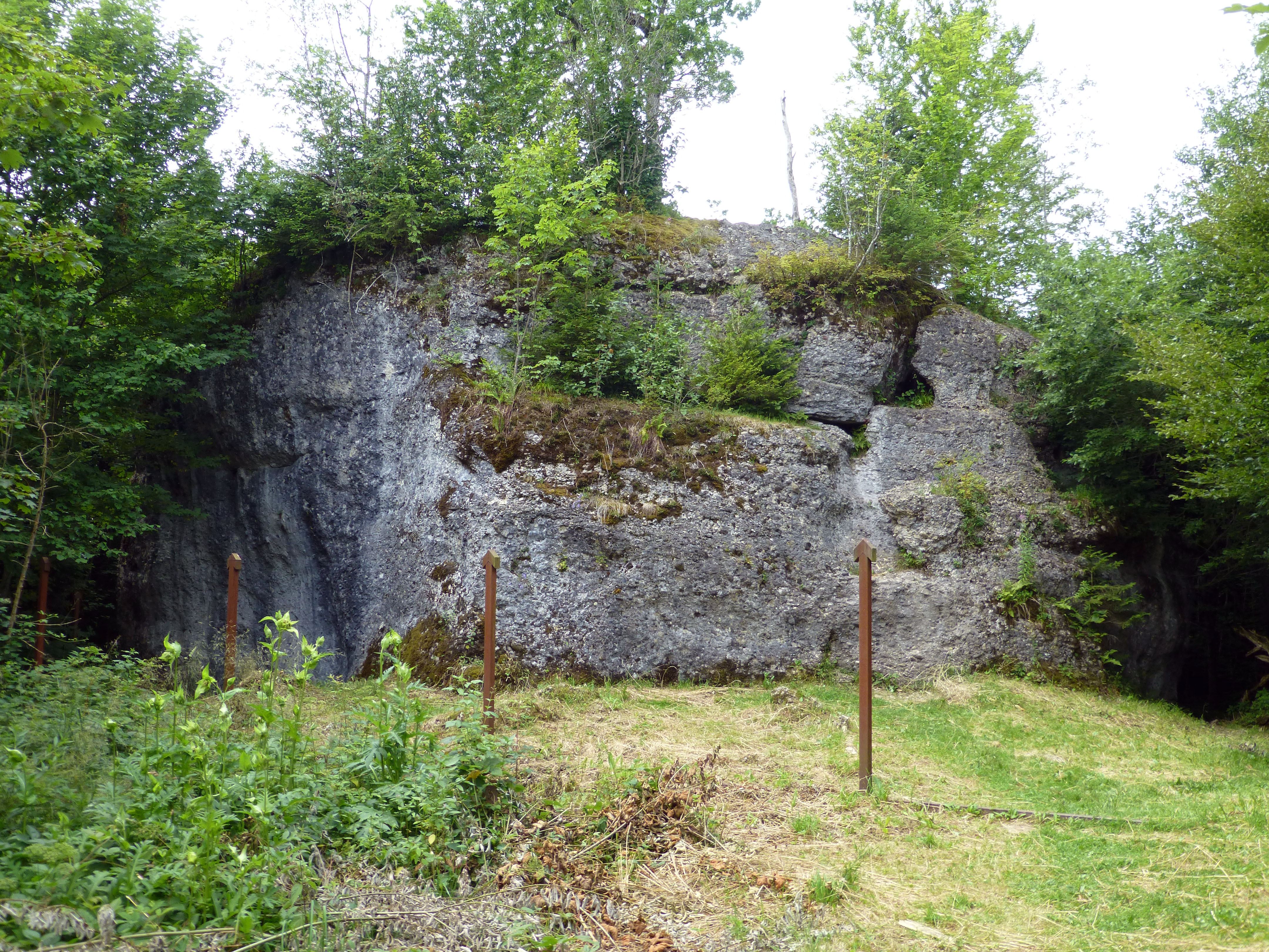 Geotop Dengelstein, Findling im Kempter Wald